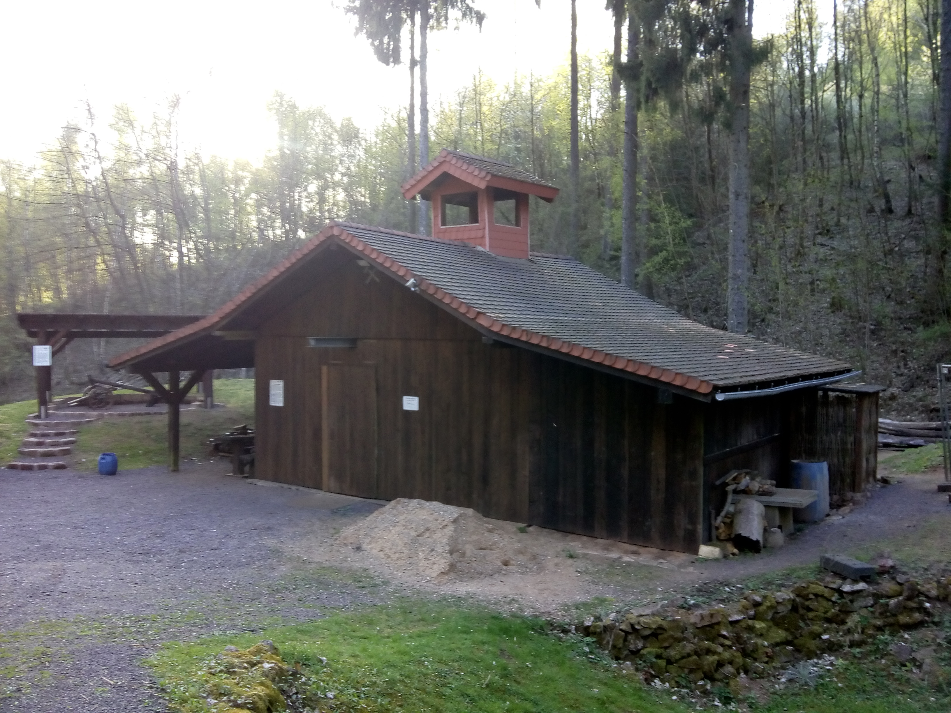 Der neue Barbaraschacht (1998/1999) ist der Zugangsschacht zur Besucherstrecke mit elektronischer Führung (Mystallica)